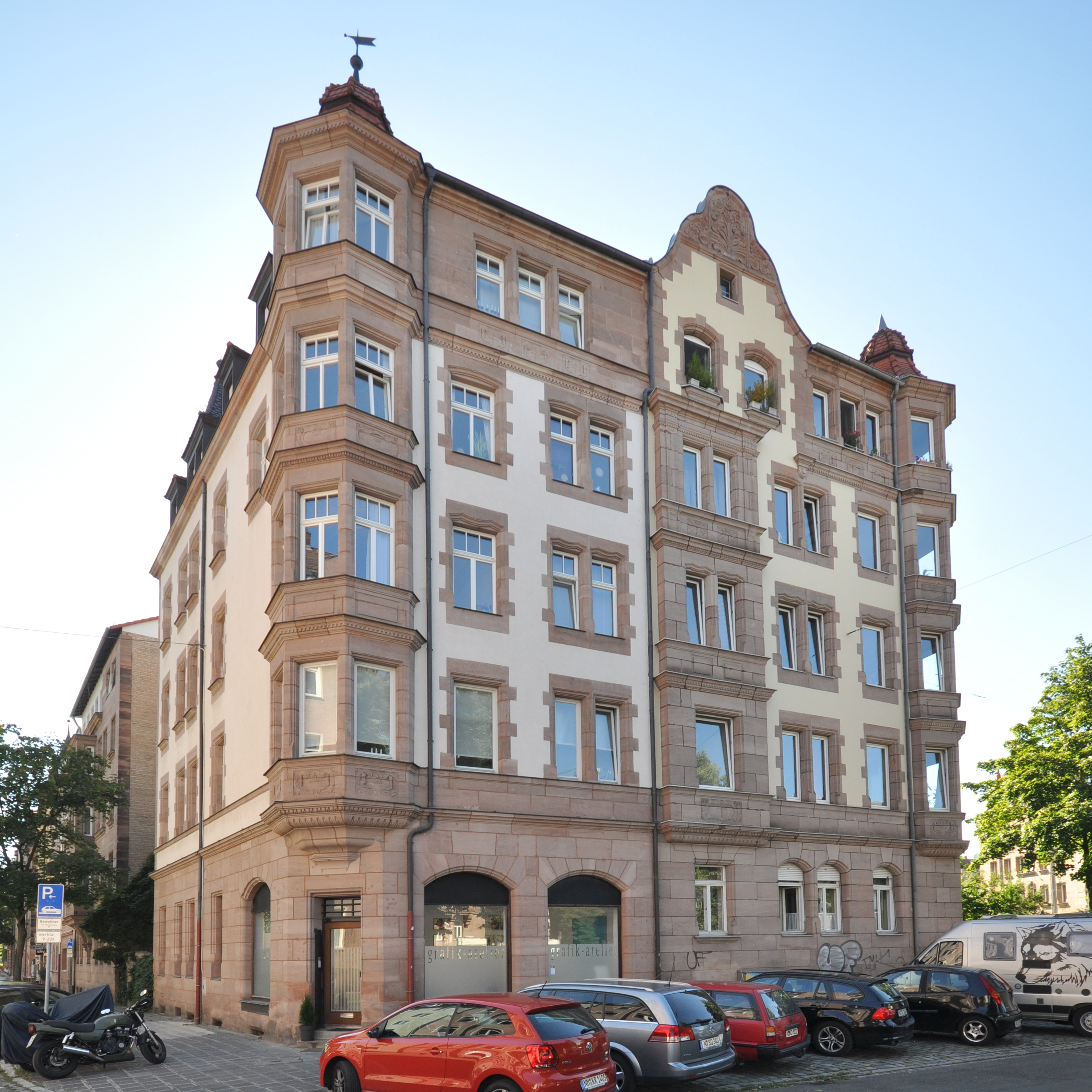 Mietshaus Adamstraße 45/Rennweg 72 (Nürnberg-Rennweg), Blick von der Adamstraße.